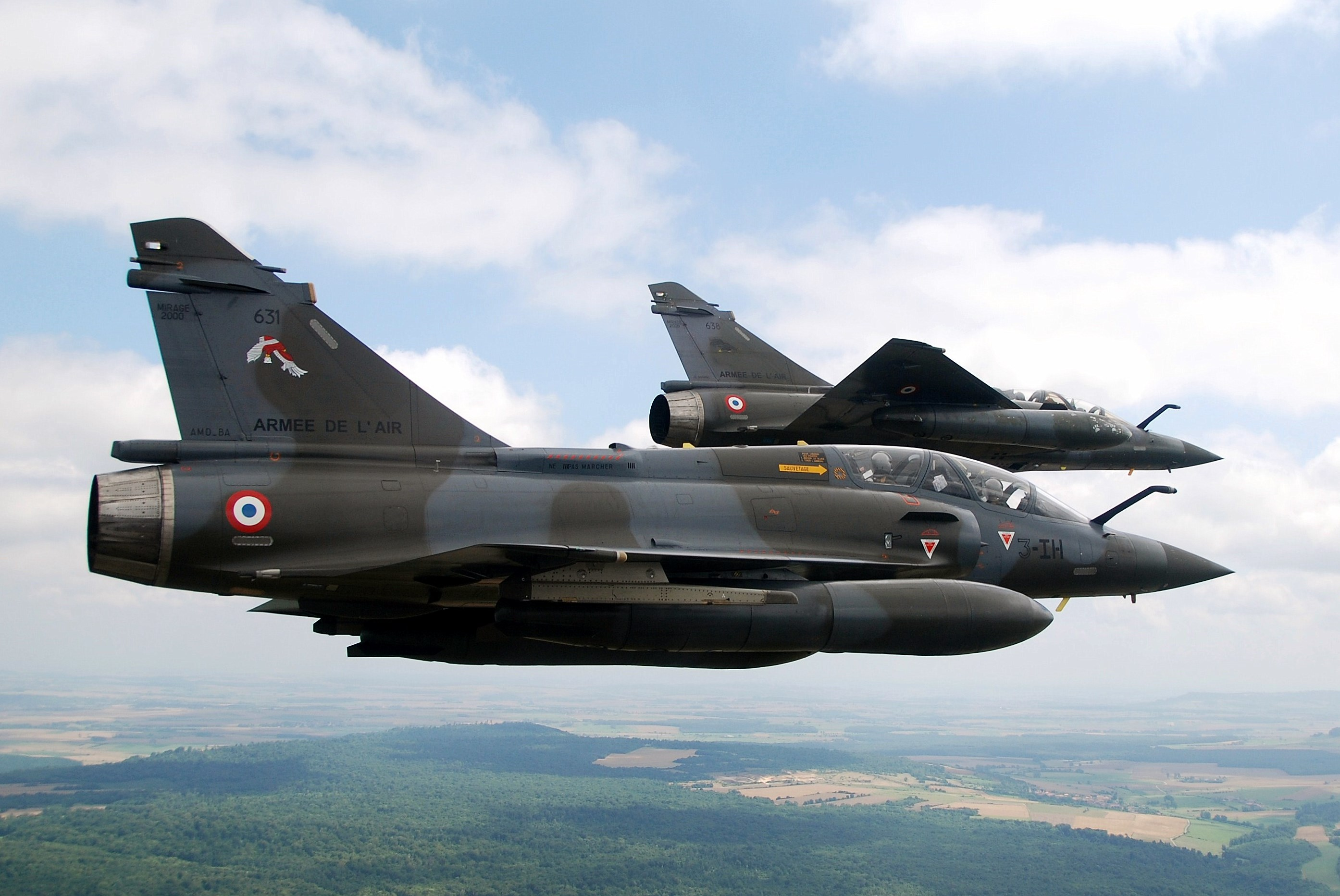 Départ au break pour une patrouille de M2000D de la SPA 153